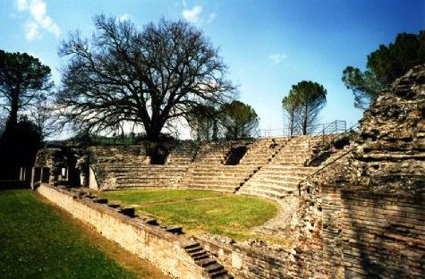 Teatro romano di Falerio Picenus